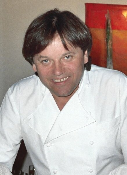 Wolfgang Puck2505